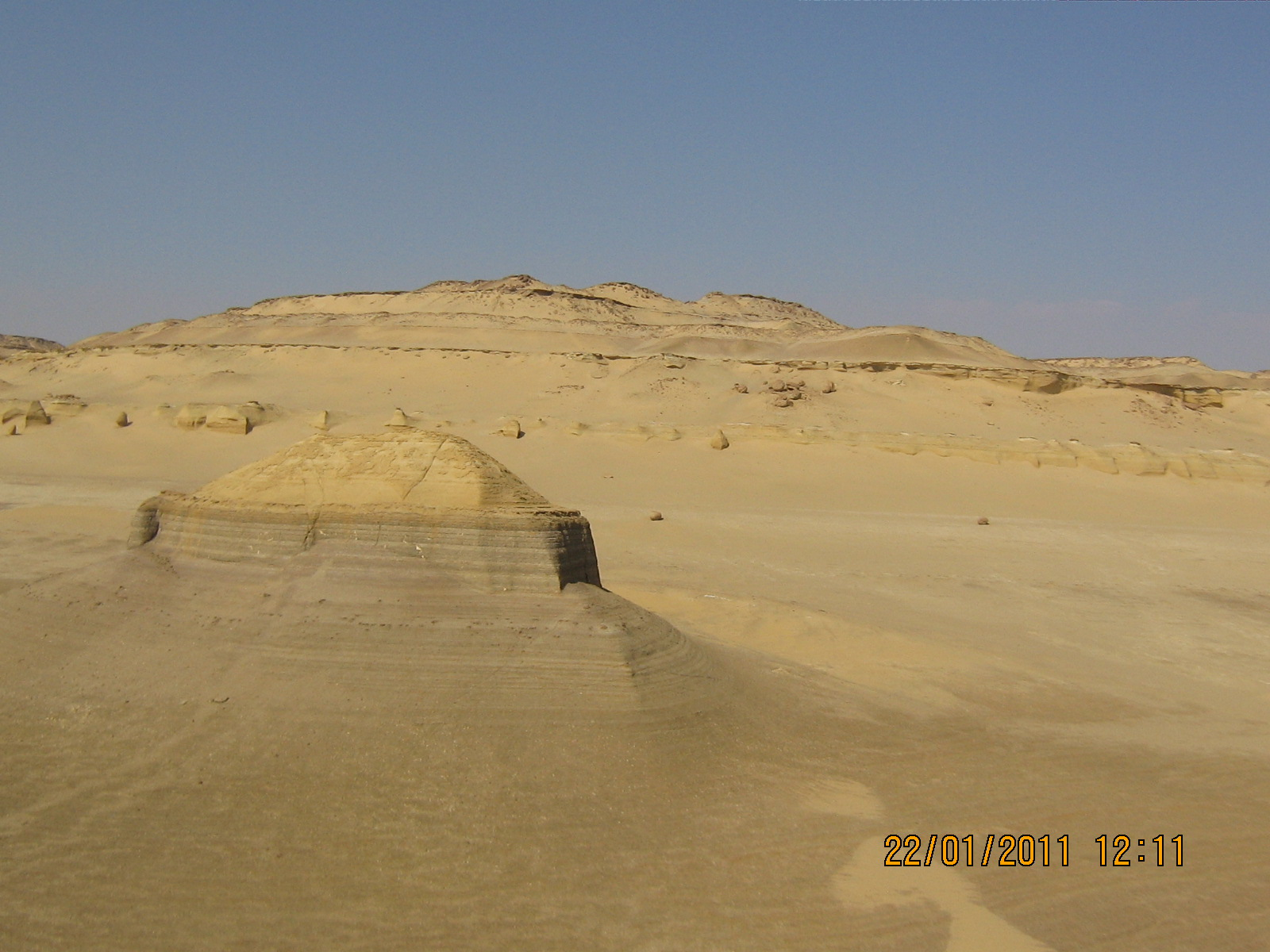 مصرى: مجموعه من الأصدقاء تقوم برحله الى محمية قارون بمحافظة الفيوم وهى مكان جيولوجى قديم جدا يعود الى عصور جيولوجيه من ملايين السنين , المكان به تكوينات ذات أشكال غريبه من نحت الطبيعه , كما يوجد به بحيرة قارون وهى من أقدم البحيرات الطبيعيه فى العالم , مع ممارسة رياضة التسلق This is an image with the theme "Play" from: Egypt